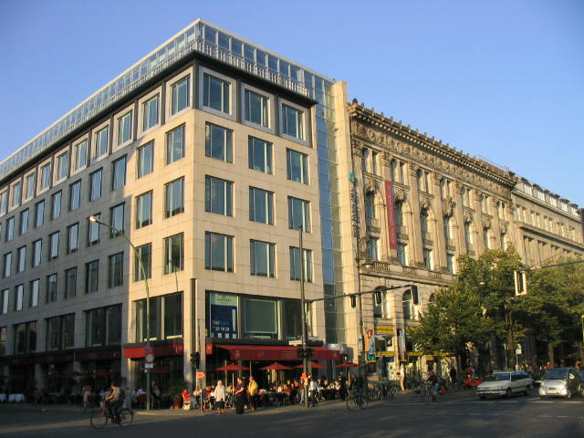 Description: Café Einstein in Berlin, Ecke Unter den Linden/Neustädtische Kirchstraße. Source: self-made, I release it into the public domain. Gryffindor 13:17, 7 February 2006 (UTC)